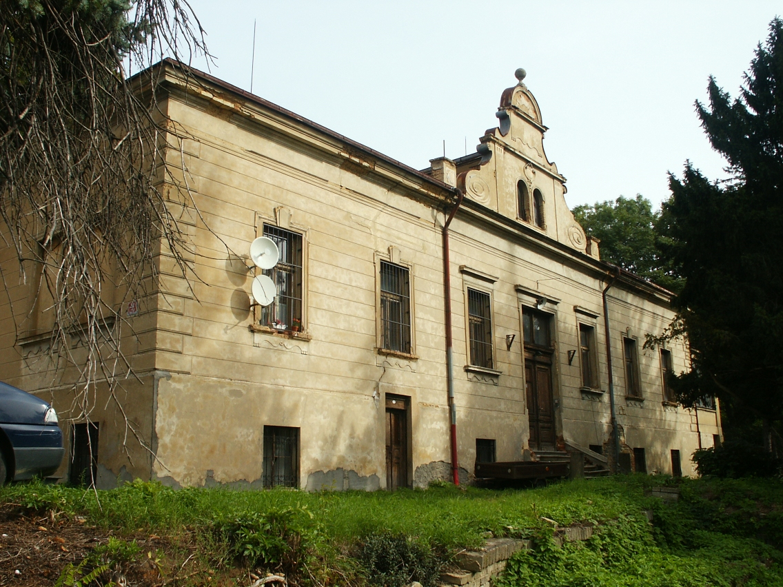 Usedlost Mazanka, Praha 8-Libeň, Zvonařovská 84/13